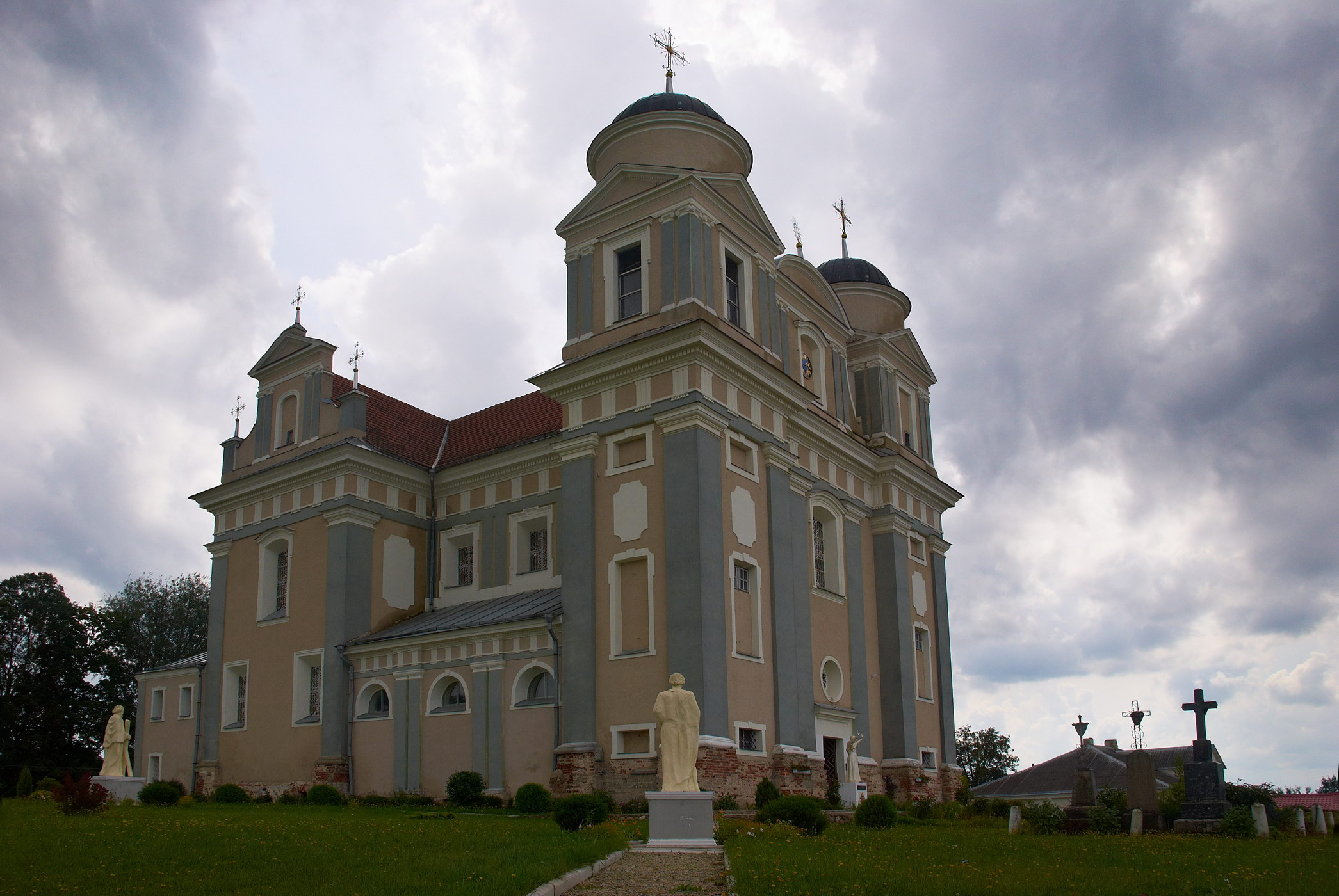 Беларуская (тарашкевіца): Касьцёл Сьвятога Тадэвуша, росьпісы інтэр’ера. в. Лучай This is a photo of Belarusian heritage monument. Reference number: 212Г000596 ( WLM)